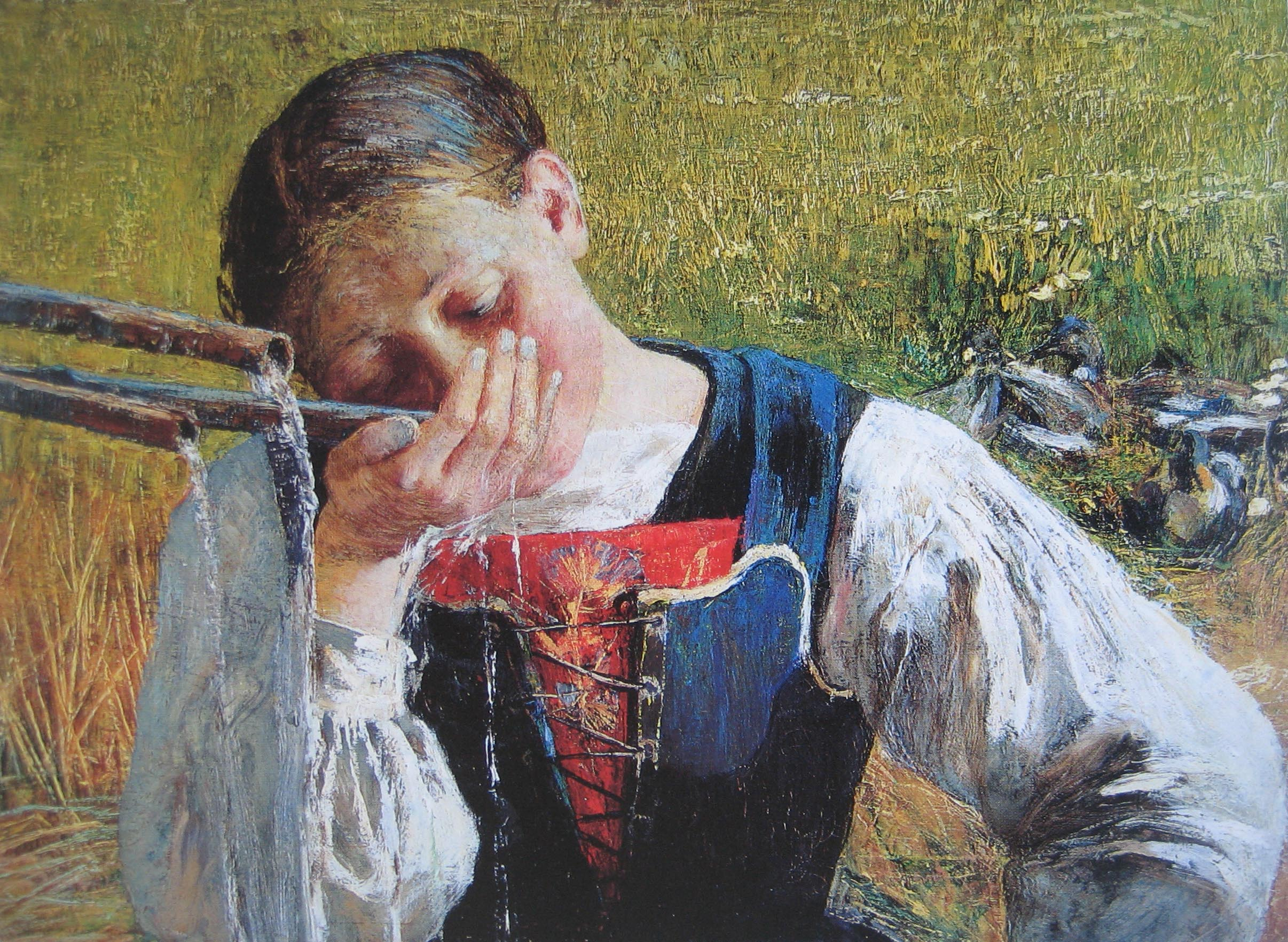 Costume grisonlabel QS:Lde,"Bündnerin am Brunnen"label QS:Len,"Costume grison"label QS:Lfr,"Costume grison"label QS:Lit,"Costume grigionese"